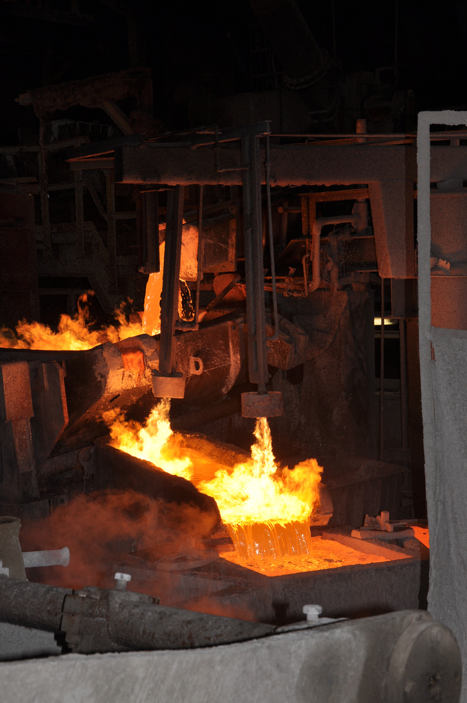 Mopani Mine in Zambia